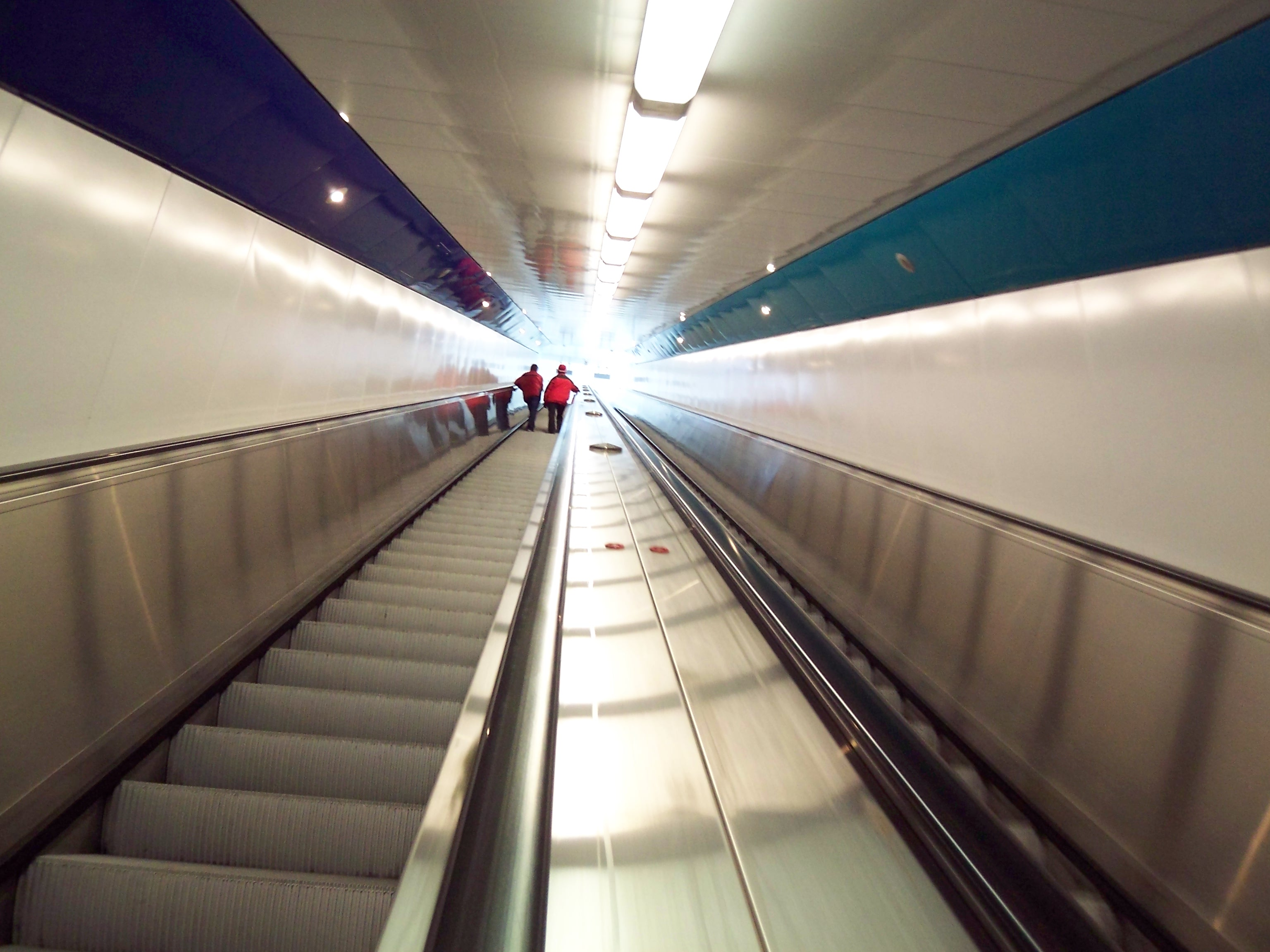 Rolltreppe im Nordaufgang des Fußgängertunnels unter dem Nord-Ostsee-Kanal in Rendsburg (ehemals die längste Rolltreppe Europas)